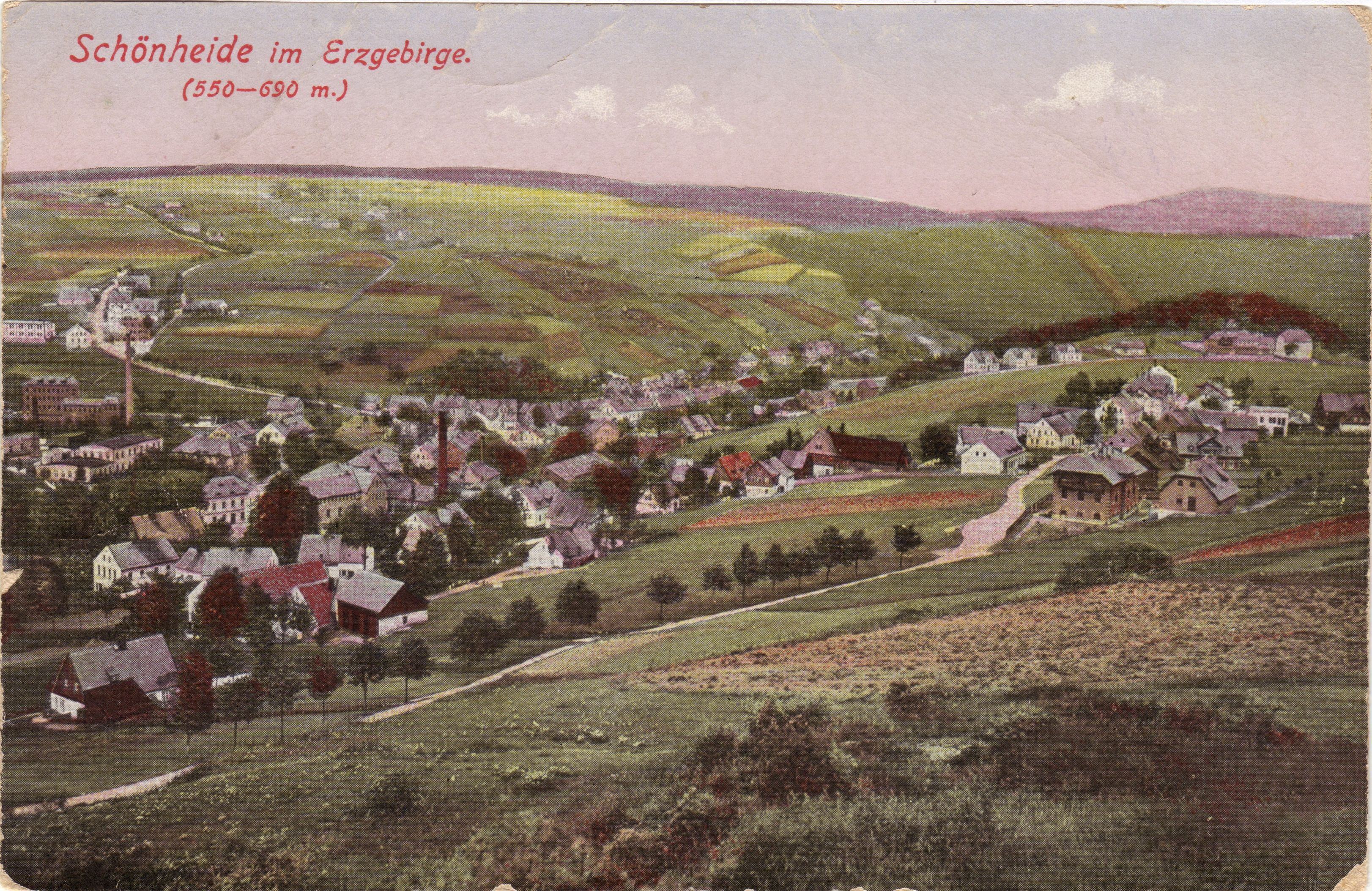 Blick vom Ostabhang des Berges Knock auf den unteren Teil von Schönheide im Erzgebirge: im Vordergrund rechts das ehemalige Krankenhaus und die Häuser des Ortsteils Schädlichsberg, dahinter rechts vor dem Wald die frühere Hammerschule (1908 gebaut), links davon die Häuserreihe, Guchheh genannt, davor die grüne Fläche: Gebiet des früheren Uttmannschen Vorwerks, links im Tal des Dorfbaches, der in den Filzbach fließt, das Schönheider Unterdorf, weiter unten die Häuserreihe der Ziegenleithe. Links oben der Ortsteil Webersberg mit seiner verstreuten Bebauung, in diesem Ortsteil auf halber Höhe am linken Bildrand die Kunzmannsche Fabrik, gegenüber Emil Kunzmanns Villa.